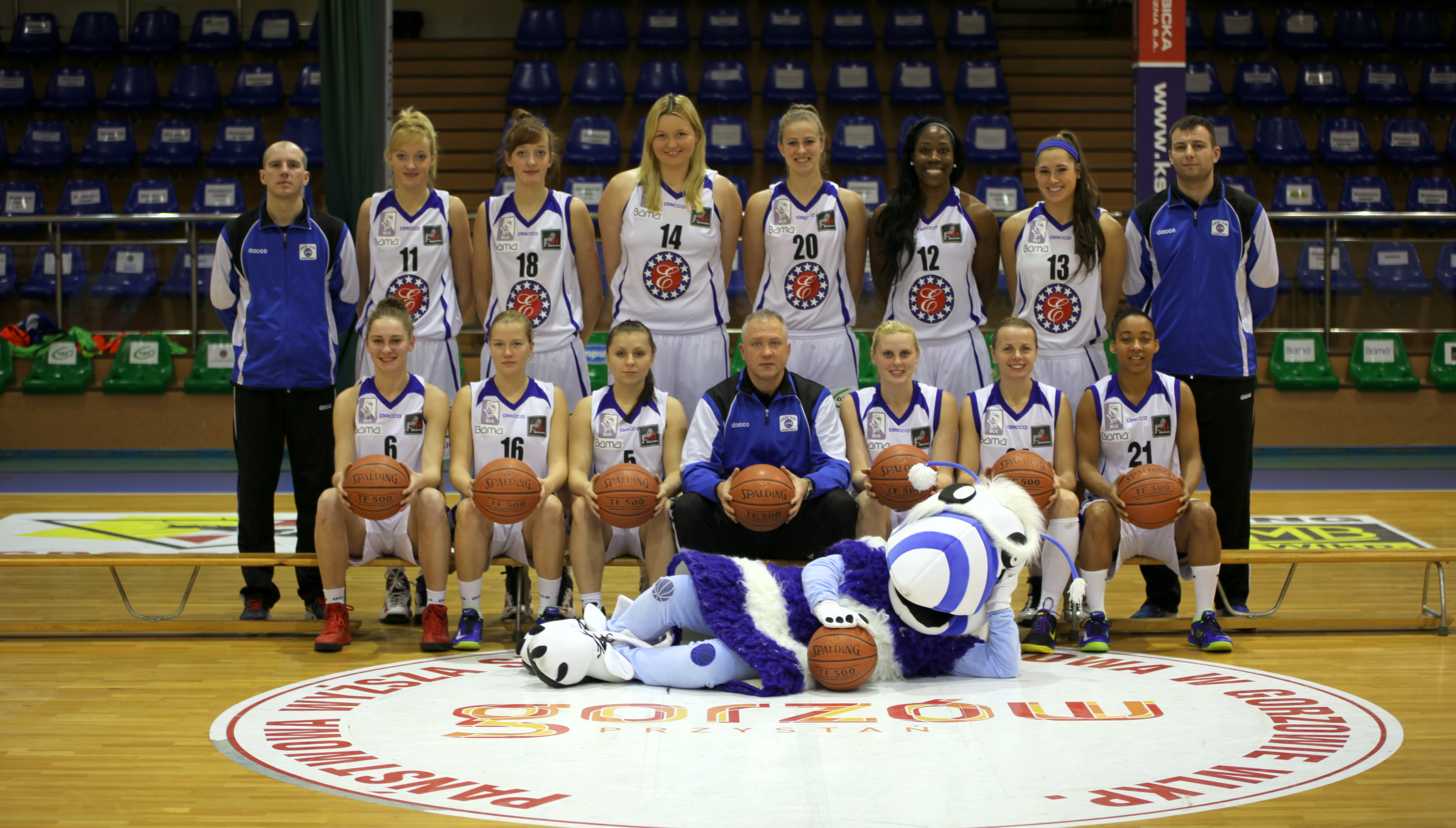 Drużyna ekstraklasy koszykówki kobiet KSSSE AZS PWSZ Gorzów Wielkopolski w sezonie 2013/14